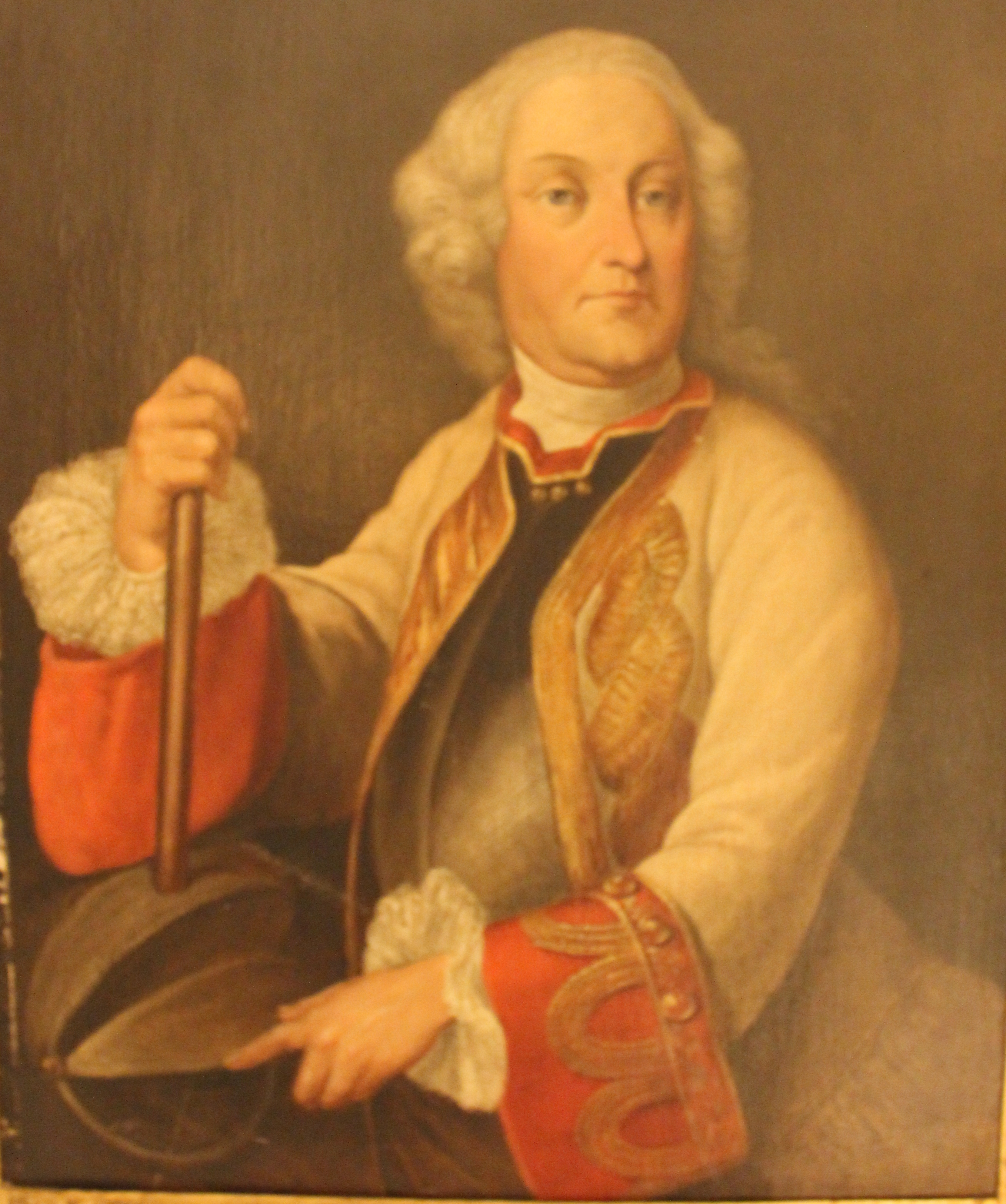 Ferdinand Charles Gobert d'Aspremont-Lynden, Baron de Froidcour, Feld Marechal, Gouverneur General du Milanais